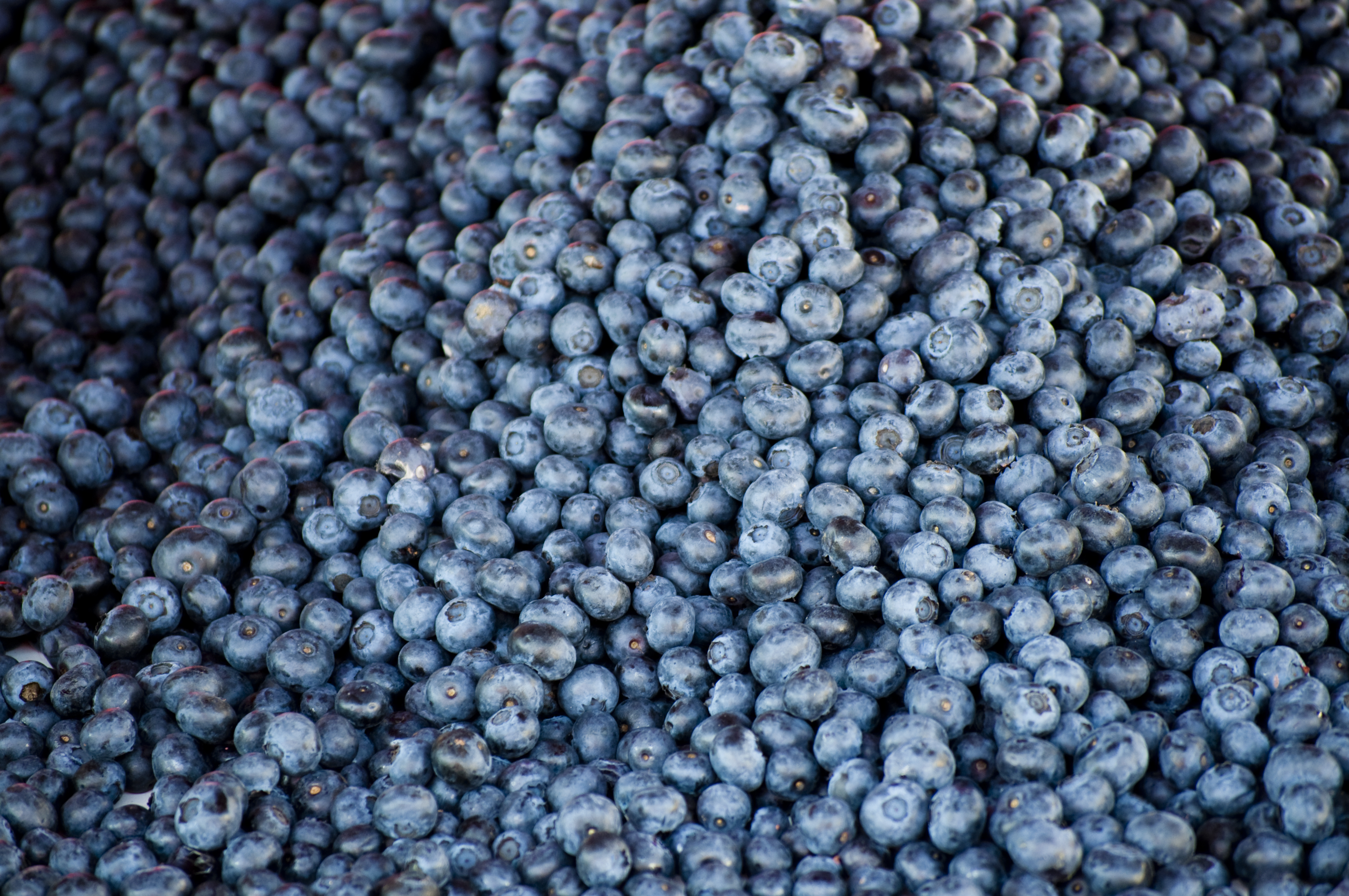 blue, plantae, angiosperms, market, ericales, ericaceae, blueberries, vaccinium